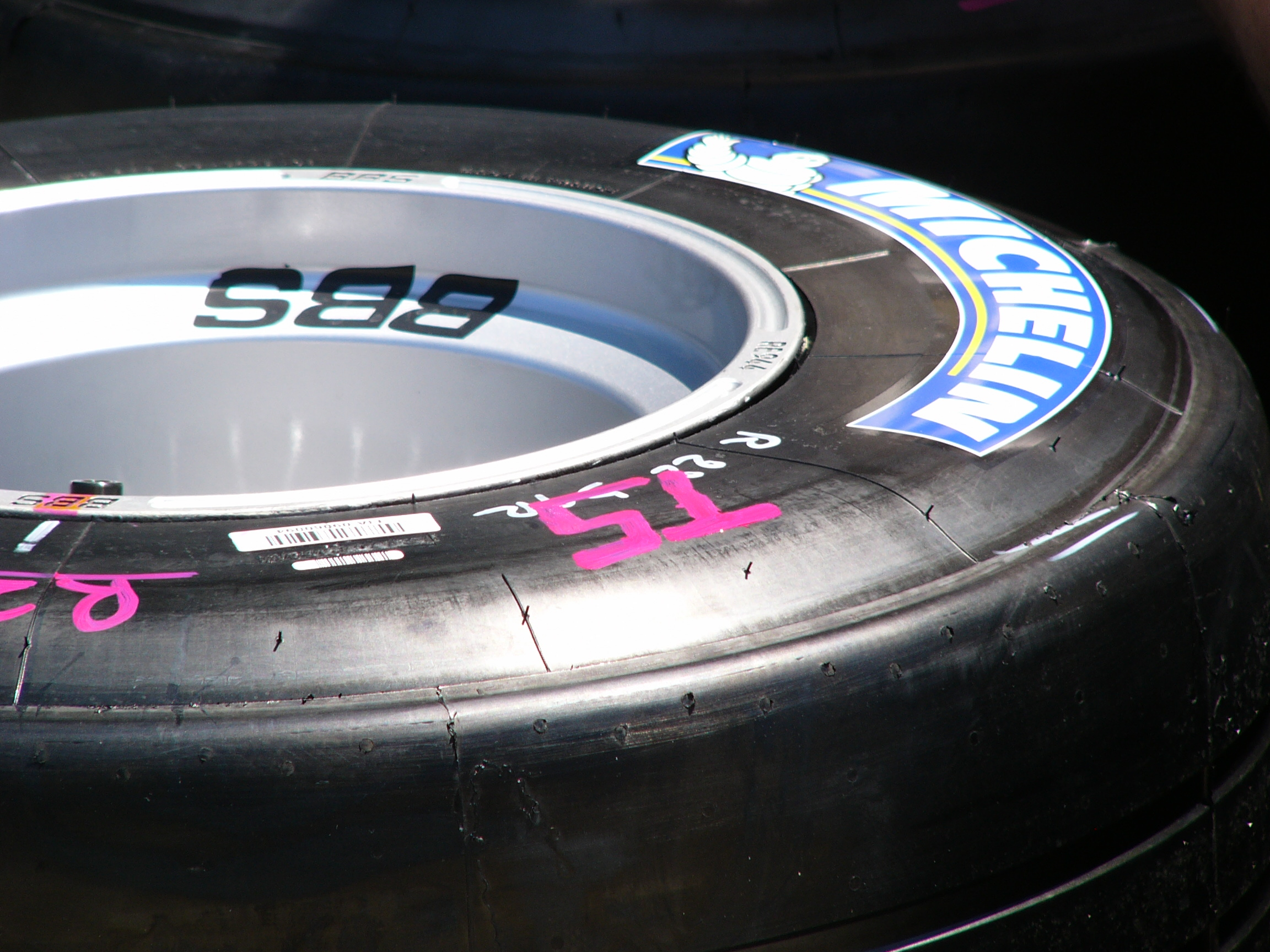 TSってついてますね